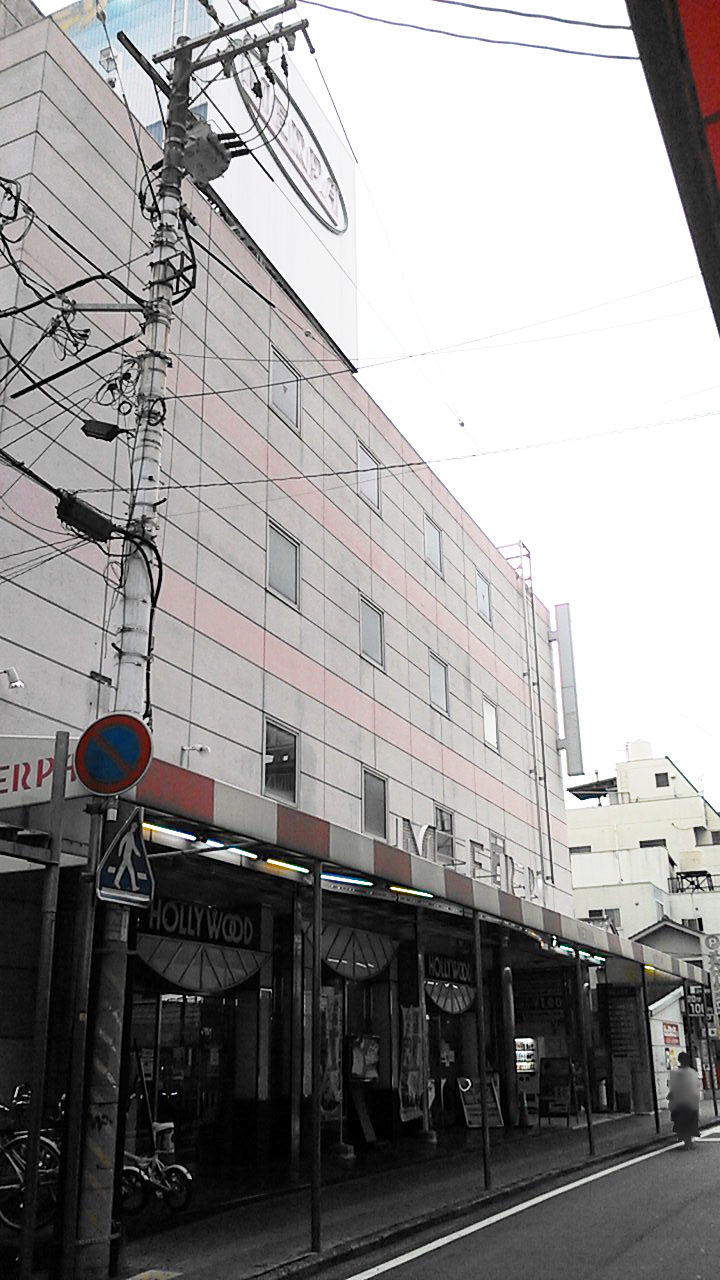 岡山メルパビル全景。駅前商店街側より撮影